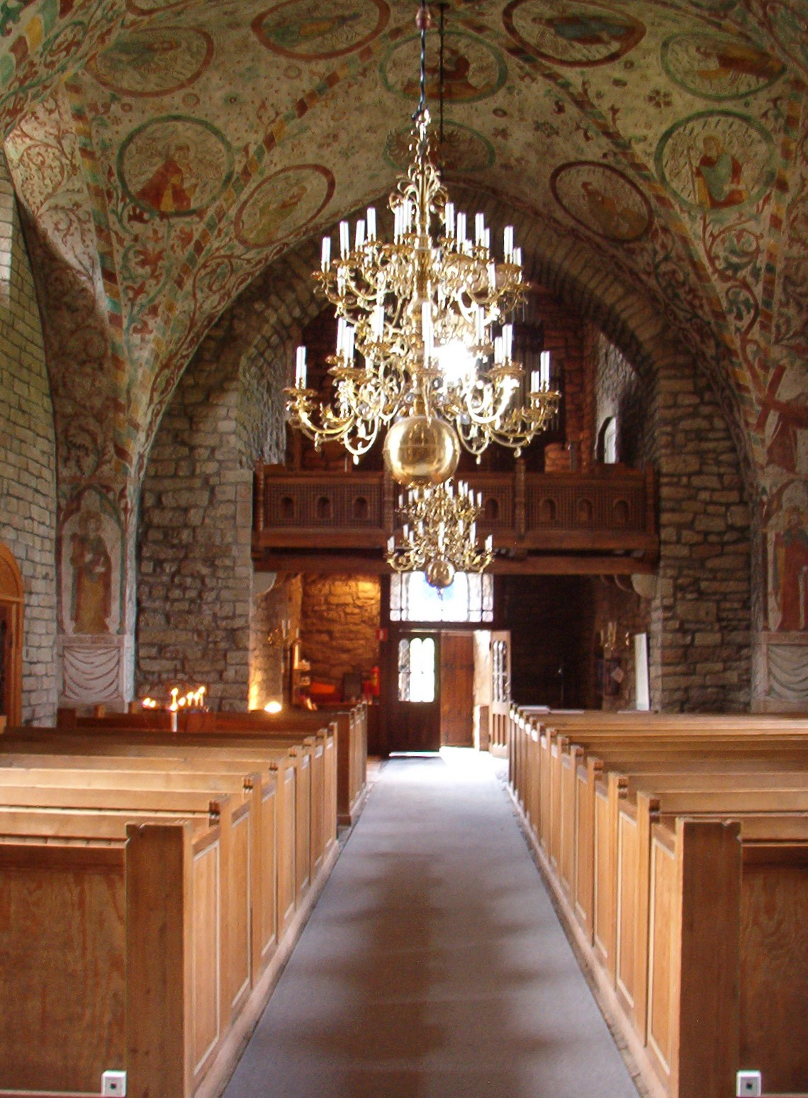 Date: Aug 10, 2005